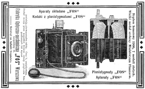 Fabryka Przyrządów Optycznych „FOS”. Reklama z książki "Podręcznik fotografii praktycznej. Przewodnik dla amatorów i zawodowców" z 1905.